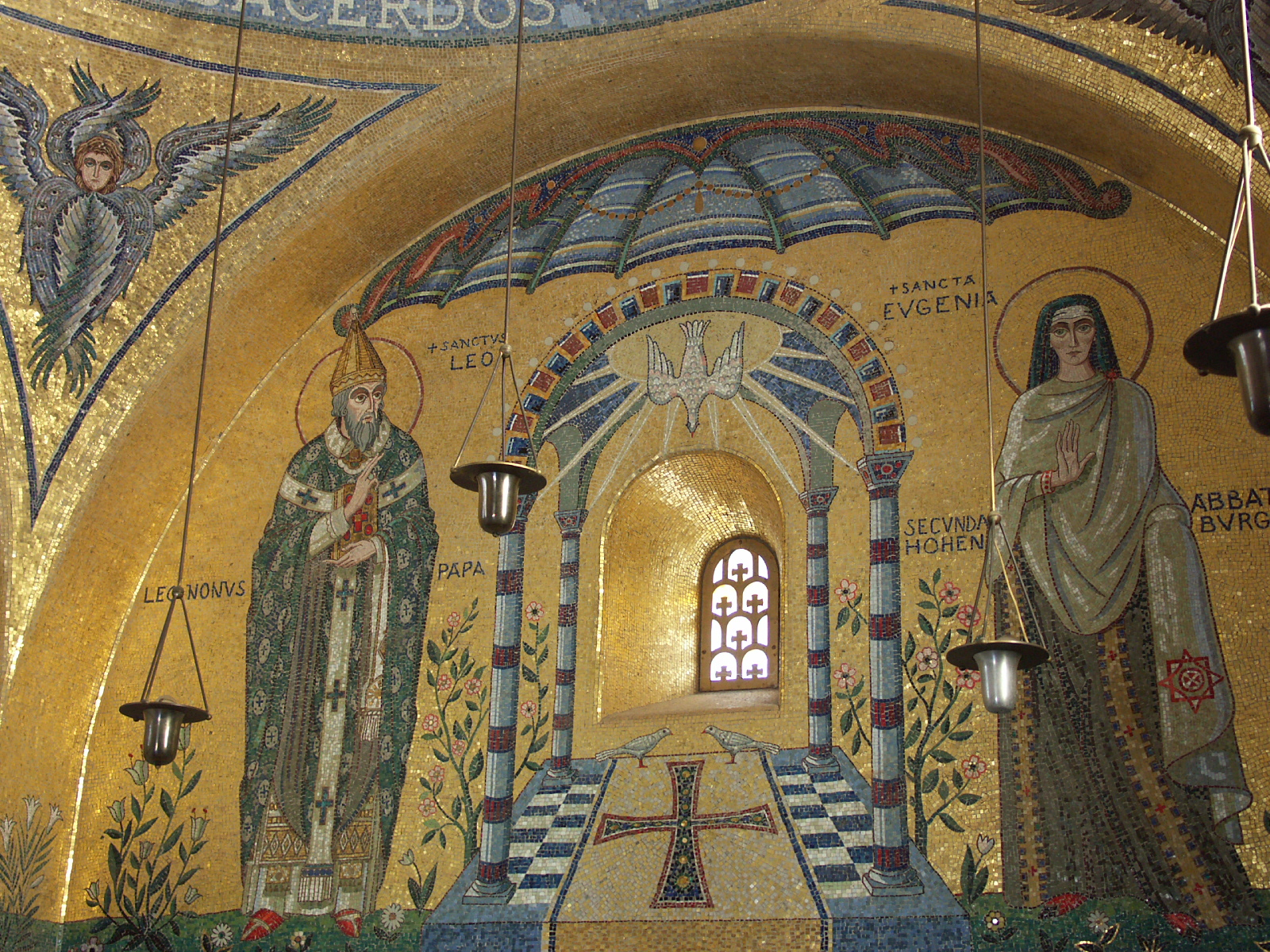 Mont Sainte-Odile, Alsace, France